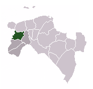 Lizzing Humsterlân yn Grinslân. Nedersaksies: Lokoatsie van t Homsterland ien Grunnen.